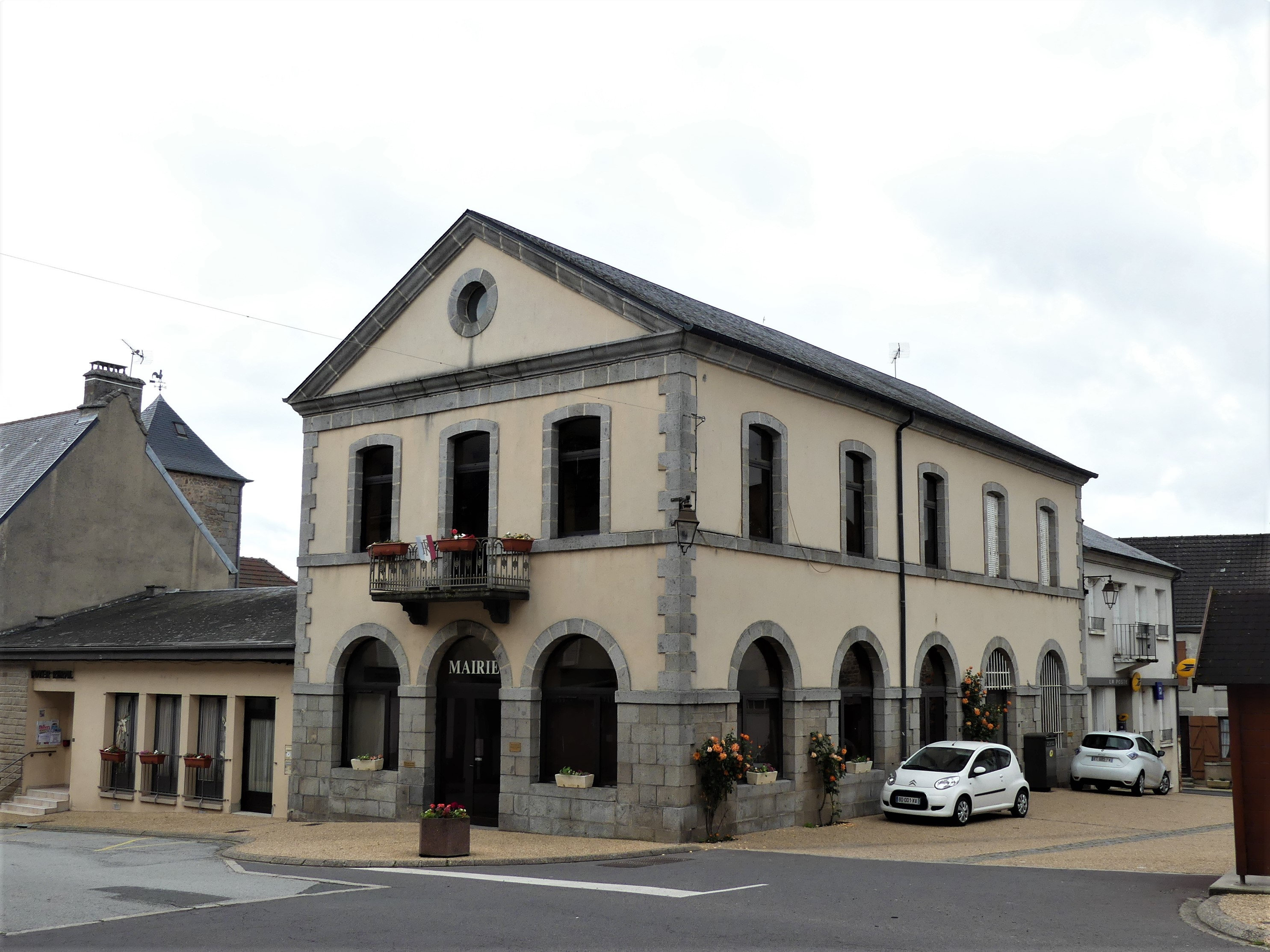 La mairie de Bellegarde-en-Marche, Creuse, France.